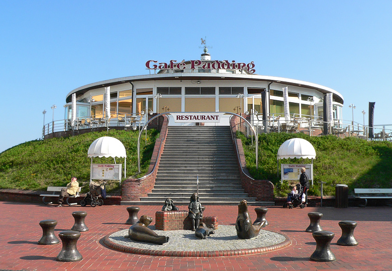 Wangerooge, Cafe Pudding mit Skulpturengruppe von Judith von Eßen Foto aufgenommen von Benutzer Axel Hindemith, Mai 2006